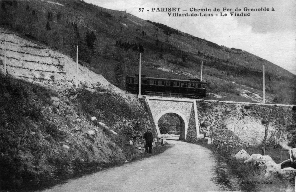 Chemin de fer Grenoble - Villard-de-Lans. Pariset, Seyssinet-Pariset, Isère, France.